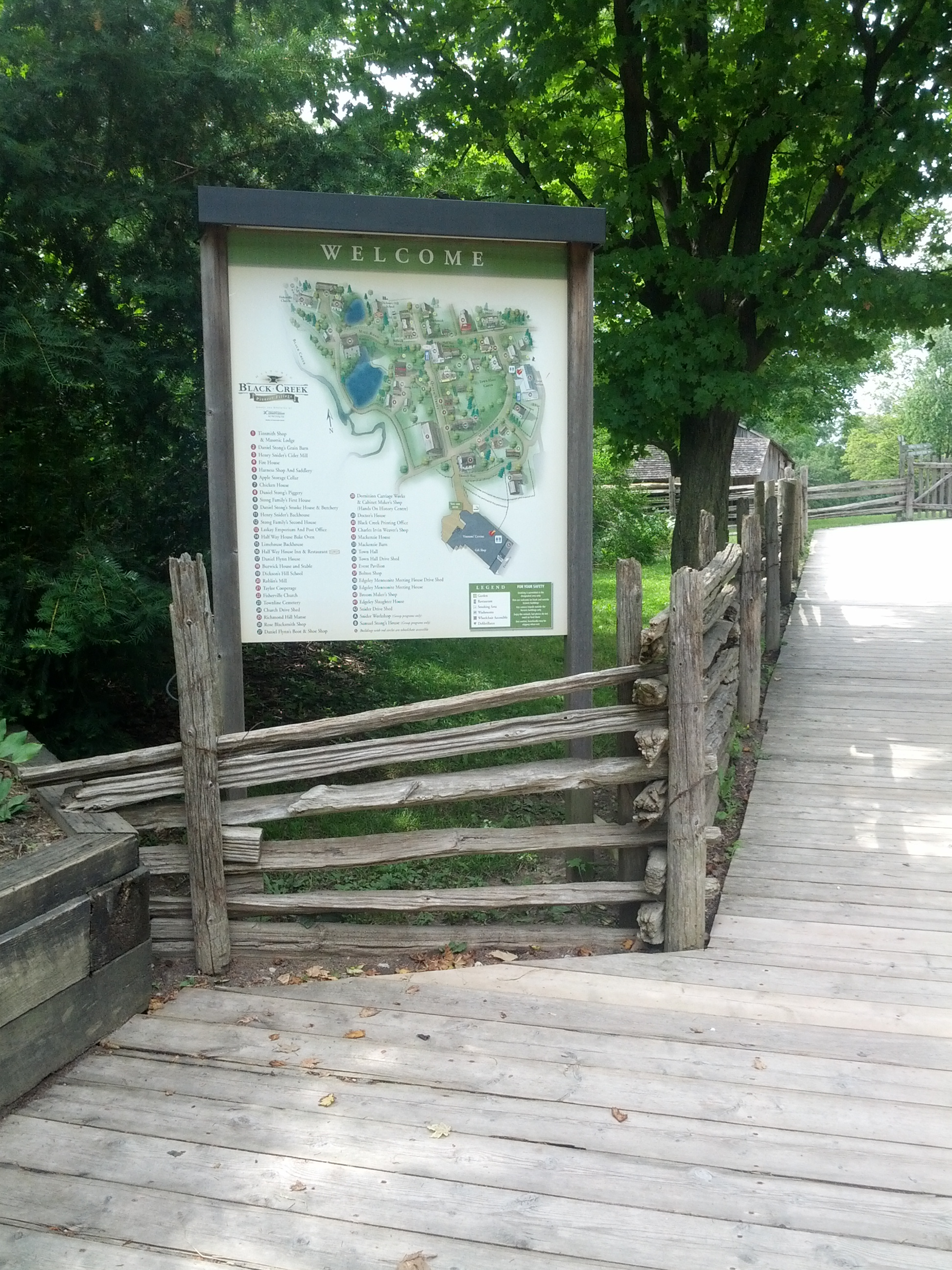 Mapa da Black Creek Pionner Village.